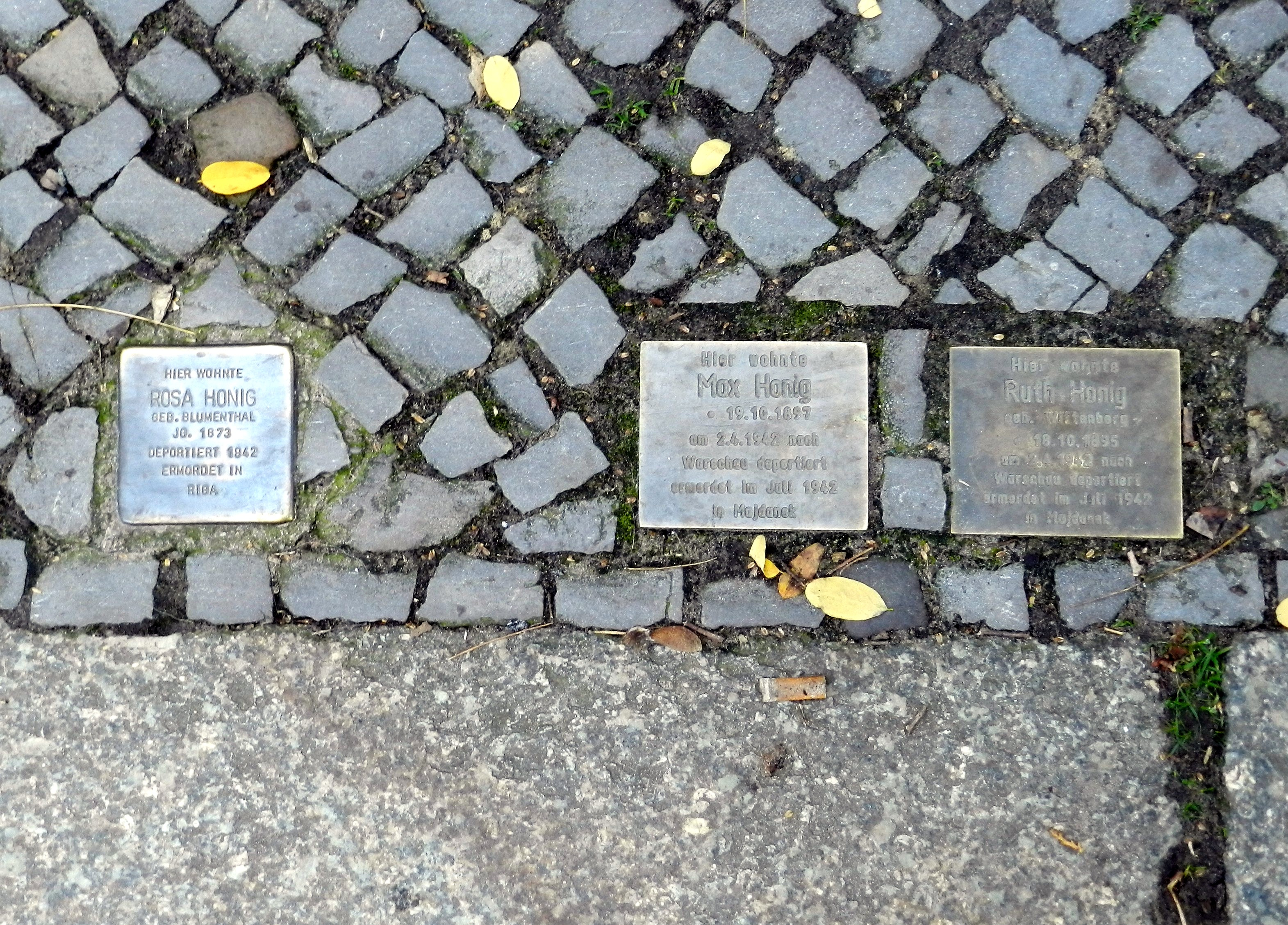 Stolperstein für Rosa Honig (links) neben zwei Denksteinen für Max und Ruth Honig (rechts) in der Variner Straße vor Haus Nr. 9 in Berlin-Friedenau.